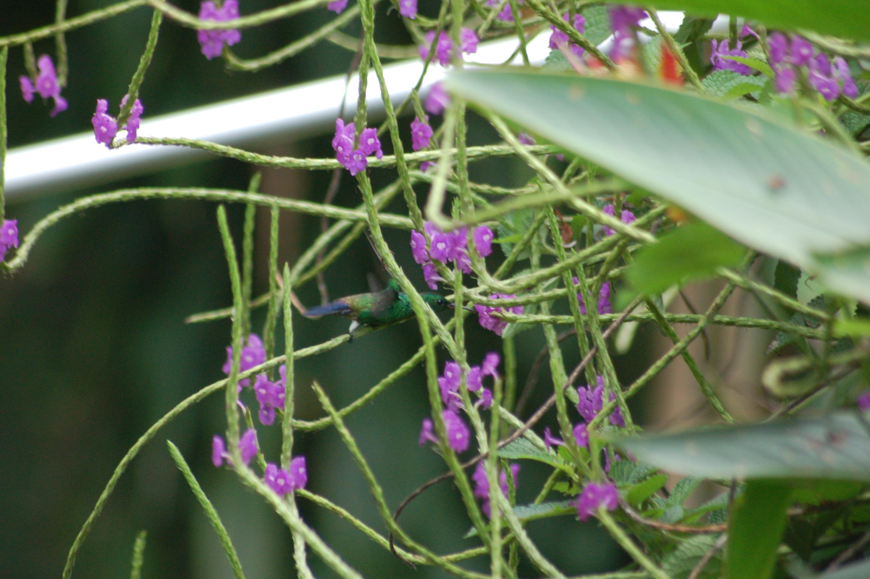 Kolibri, La Ecovilla, San Mateo, Costa Rica